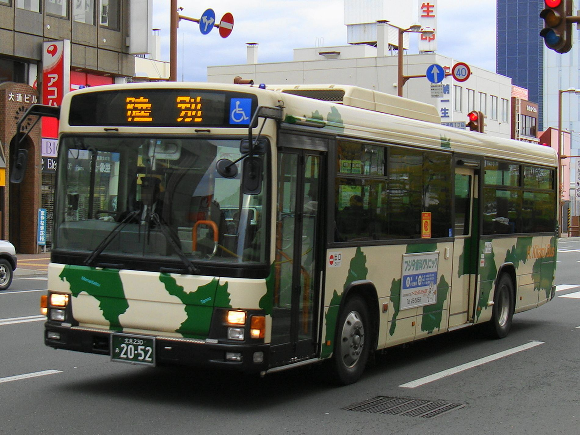 Kitami to Rikubetsu